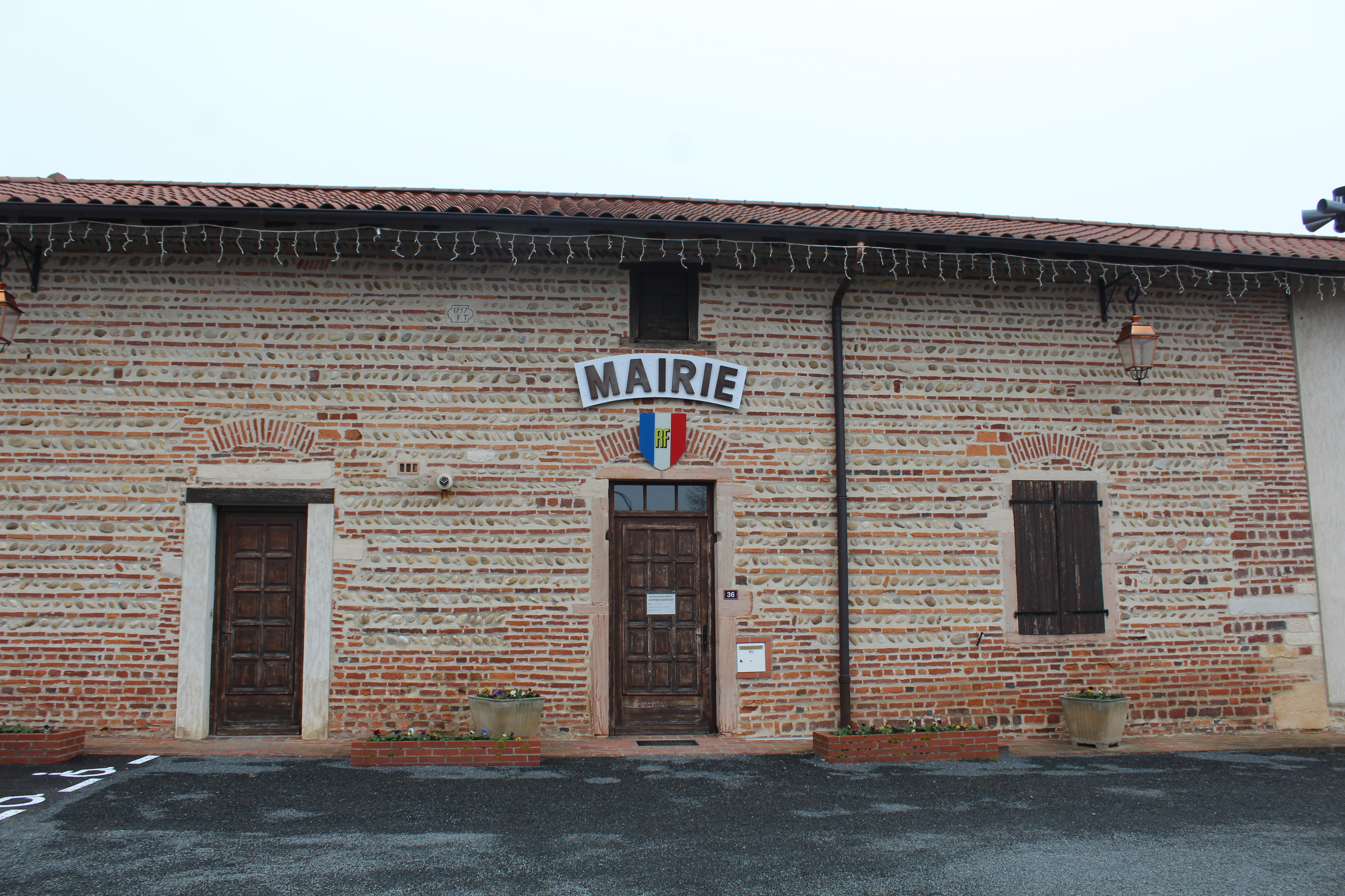 Mairie de Chanoz-Châtenay.